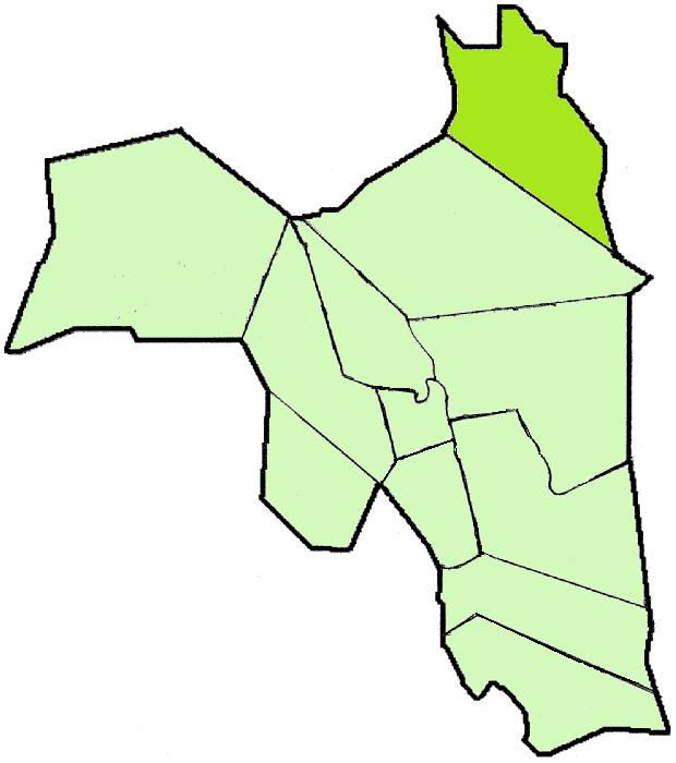 Lapinjärven kartta: Kimonkylän sijainti